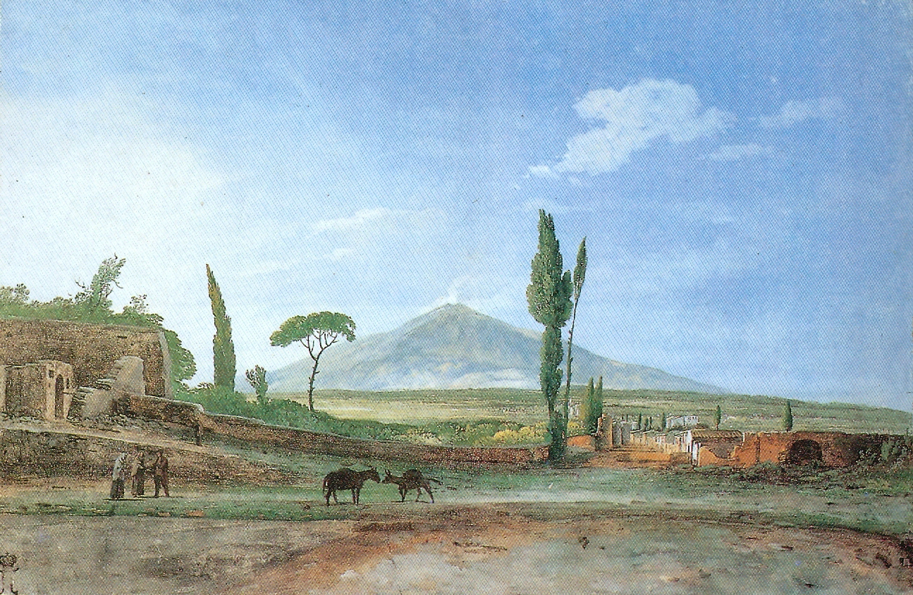 L'Etna visto da Catania. Guazzo di Jean-Pierre Houël.